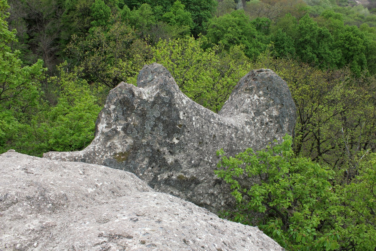 H2e, Eger, Nyerges